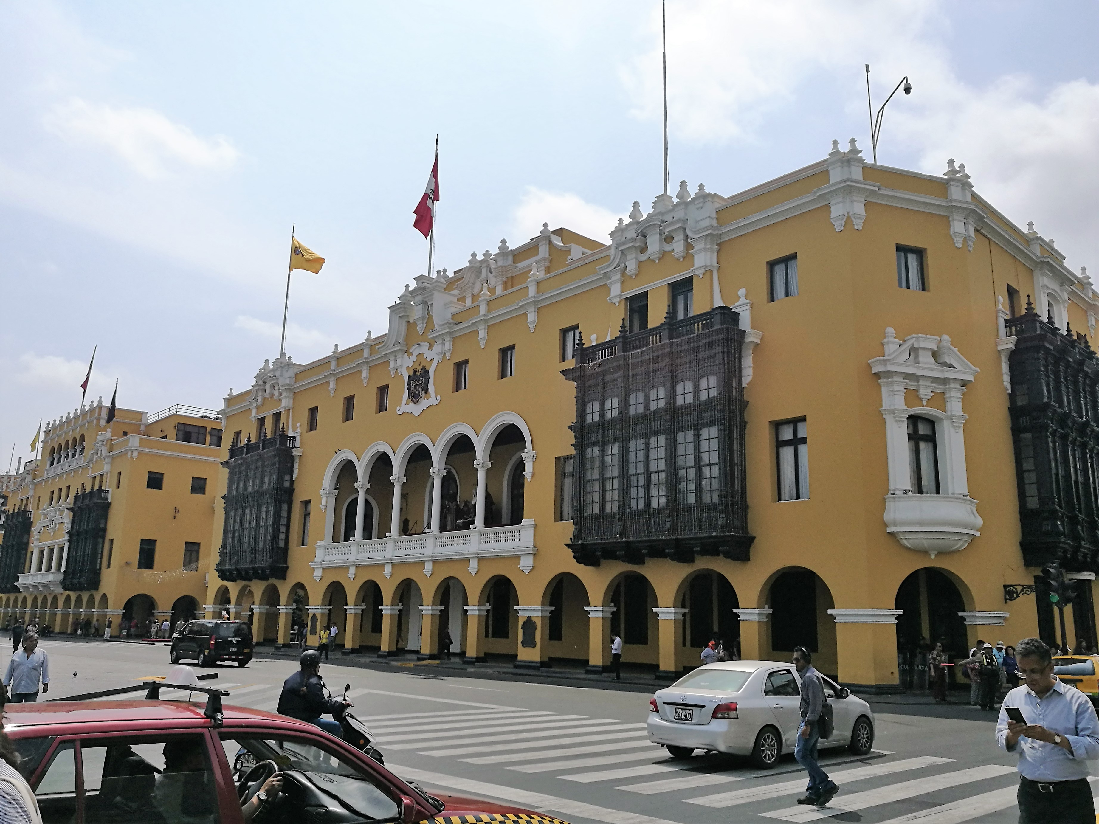 Plaza Mayor de Lima